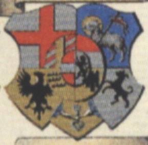 Wappen des Konstanzer Bischofs Andreas von Österreich